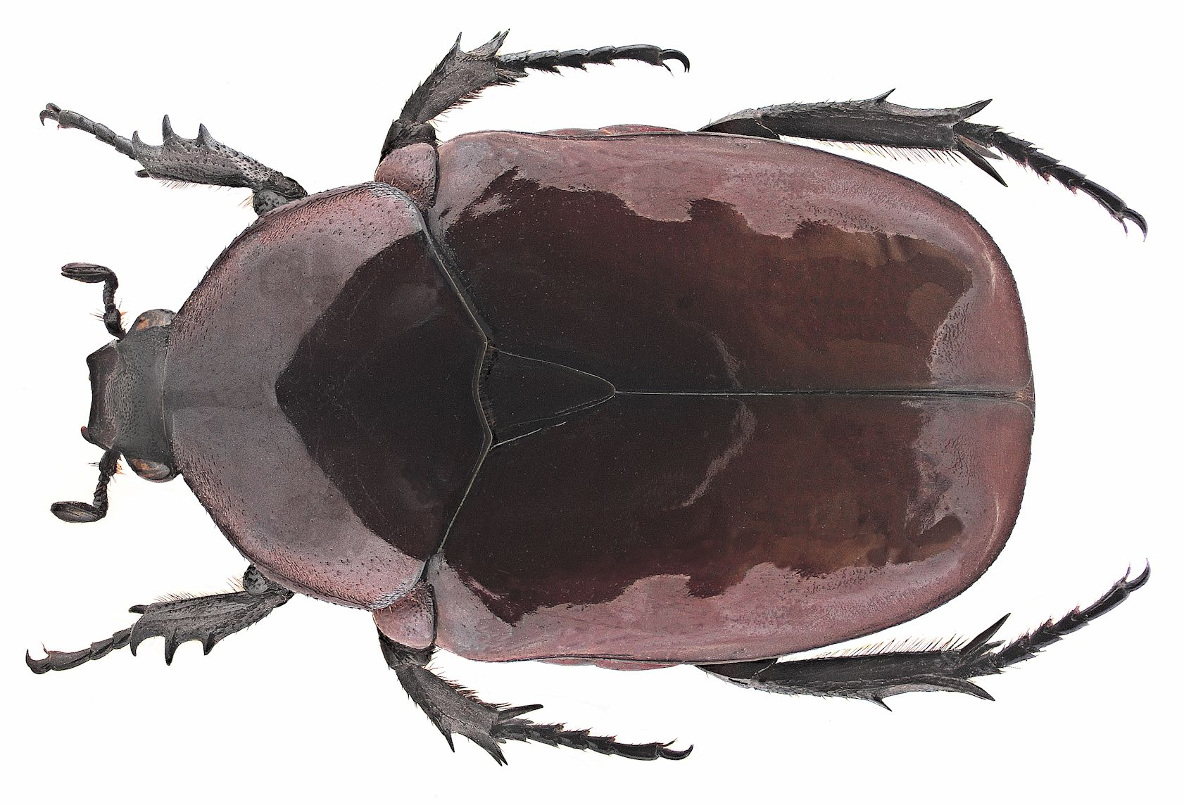 Familie: Scarabaeidae Grösse: 23 mm verbreitung: ganz Afrika südl. der Sahara Fundort: Senegal, M`Bour leg.det. U.Schmidt, 1992 Foto: U.Schmidt, 2006